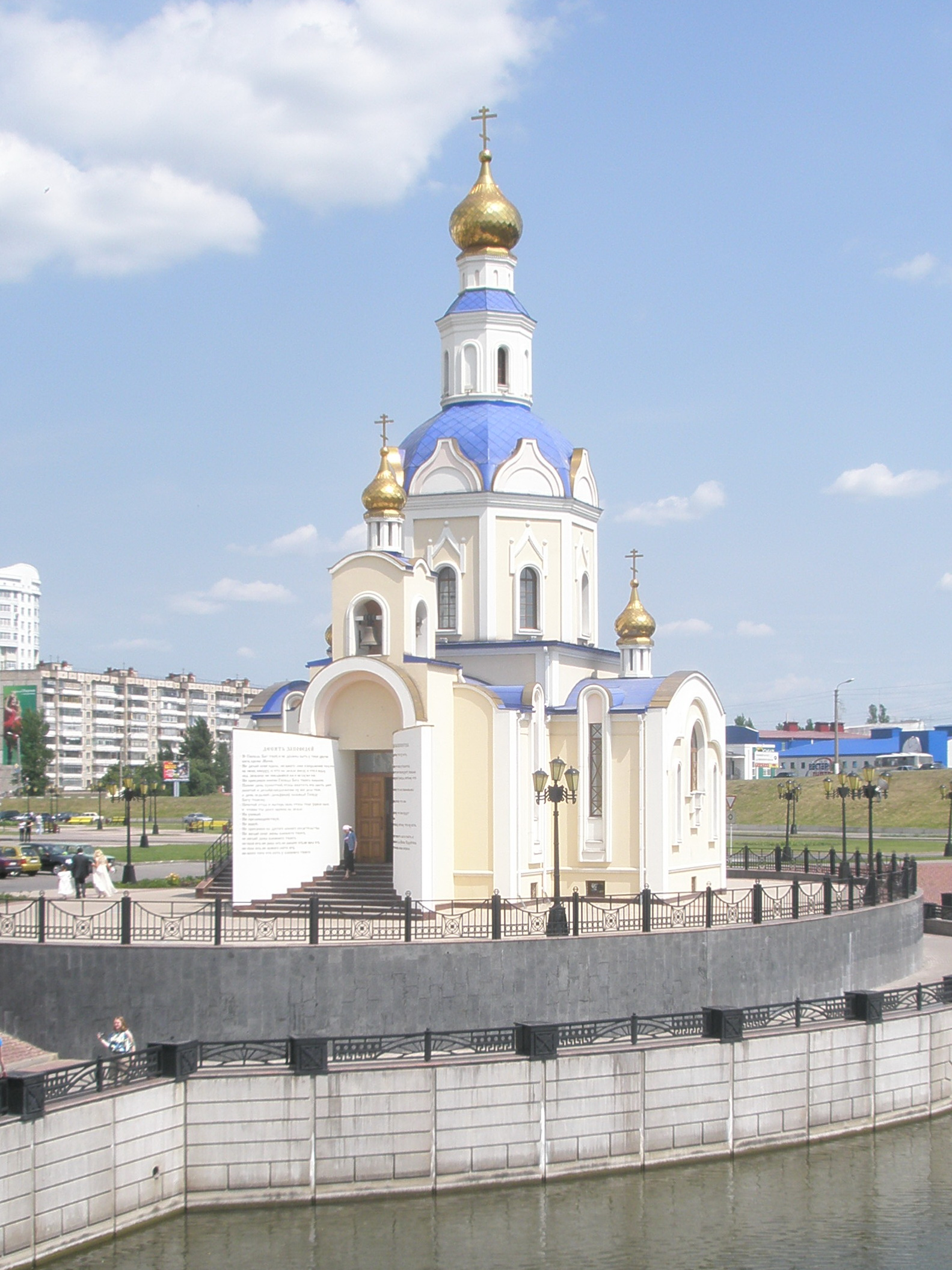 Храм Архангела Гавриила на территории университетского городка Белгородского государственного университета